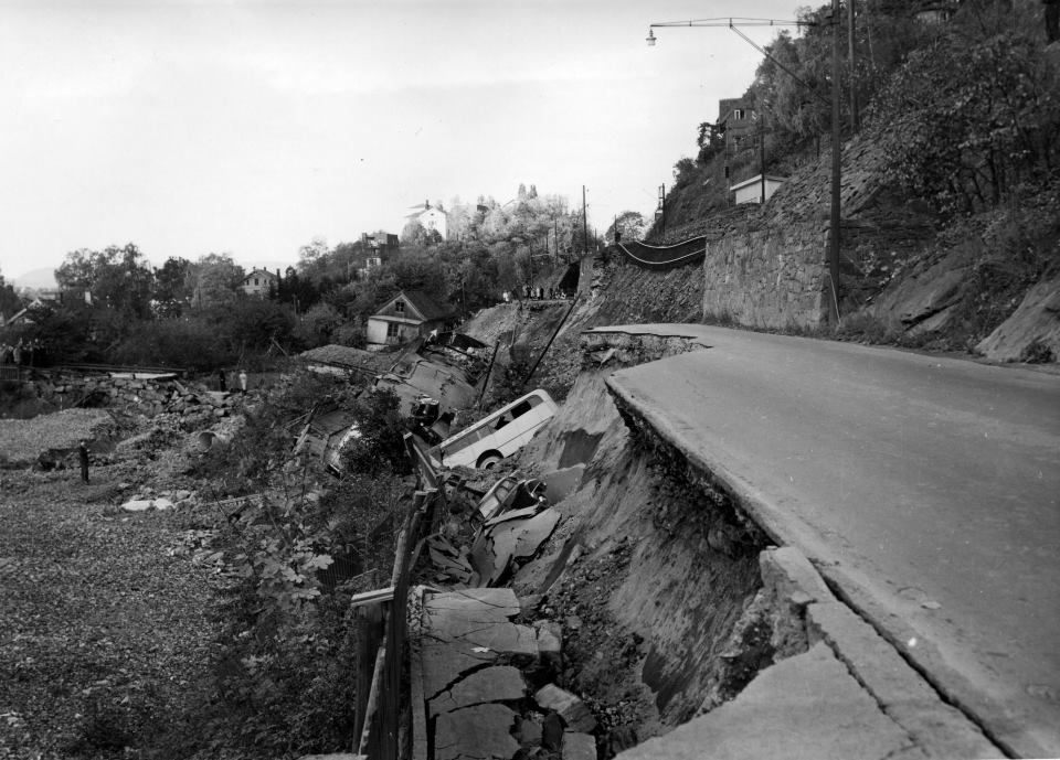 Ukens favorittbilde er valgt ut av Ellen Elster Martol, rådgiver i seksjon for eldre arkiver og spesialsamlinger. Mitt favorittbilde er ikke noe hyggelig bilde, men det viser et dramatisk barndomsminne: Raset på Bekkelaget, et villaområde sørøst i Oslo. Jeg var nesten fire år og husker det godt, med hylende sirener, katastrofestemning og omdirigering av trafikken til småveier. 7. oktober 1953, litt over halv åtte om morgenen, begynte Mosseveien ved Nedre Bekkelaget skole plutselig å gå i bølger før asfalten brakk opp, og veien og toglinjen raste ut. Lokaltoget på vei mot Oslo klarte å stoppe like før raskanten, mens morgenbussen fra Drøbak og seks biler forsvant utfor. Fire personer i bussen ble drept, og en person på toget døde senere av sjokket. Sjåførene i bilene klarte å komme seg ut og i sikkerhet da veien begynte å gynge, og det samme gjorde to syklister som var i området. Det var en spesiell opplevelse å bli minnet om dette gjennom bildene som ligger i arkivet etter Jernbanekontoret i Samferdselsdepartementet. Bildene ligger i en detaljert rapport som var utarbeidet av Norges geotekniske institutt. Den konkluderte med at raset skyldtes at stabiliteten i den underliggende leiren hadde blitt redusert ved at det opprinnelige saltinnholdet langsomt var vasket ut, samtidig som området de siste årene hadde vært utsatt for en økende belastning, blant annet med fyllingsarbeider og grøftegraving. I våre dager er vi blitt så vant til at ras blir utløst av mye nedbør, men det var altså ikke tilfelle med raset på Bekkelaget. Arkiv: RA/S-3874/E/Ef/L0294. Fotograf ukjent.